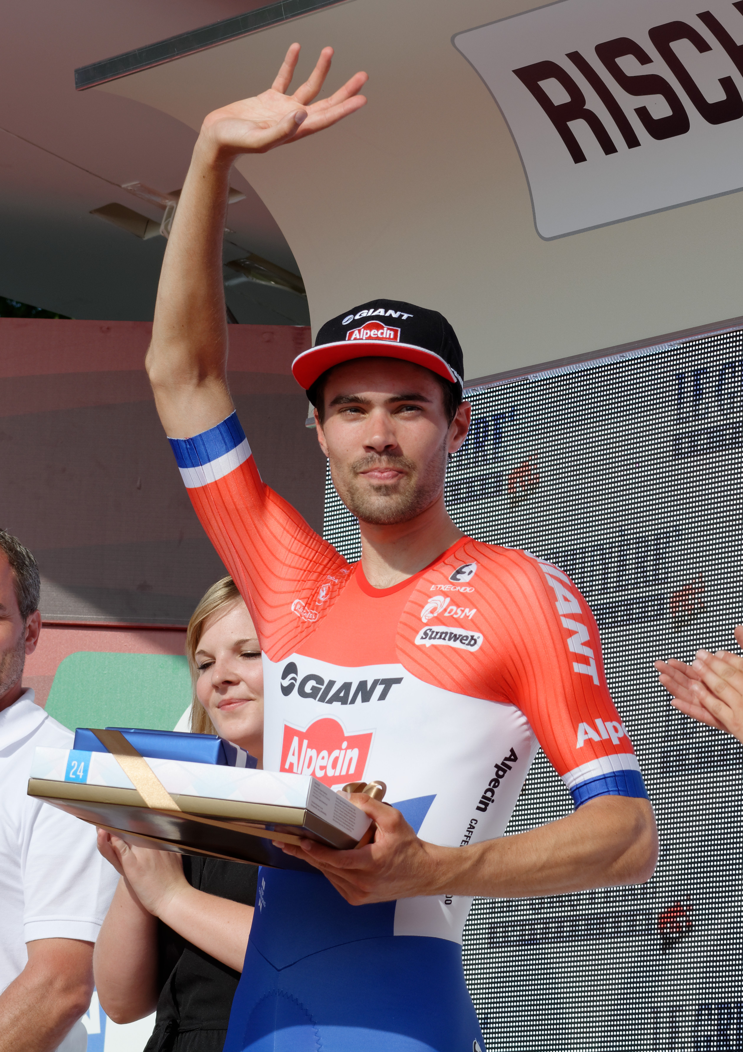 D71_9689_DxO